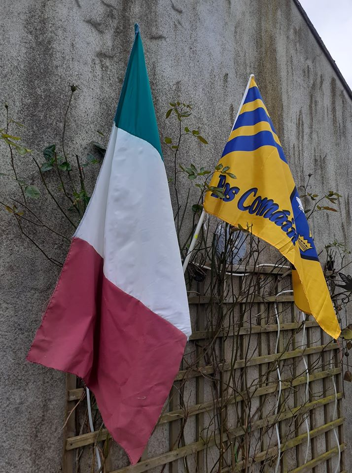 Brat Club CLG Naomh Caoimhín Chaisleán Riabhach agus brat CLG Contae Ros Comáin.